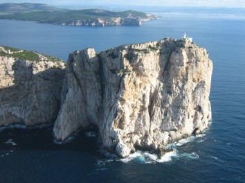 Promontorio di Capo Caccia visto da Nord Ovest. In questo lato ai piedi del promontorio, nella parte sommersa vi è una grande concentrazione di grandi grotte, tra cui la più famosa è la grotta di Nereo.